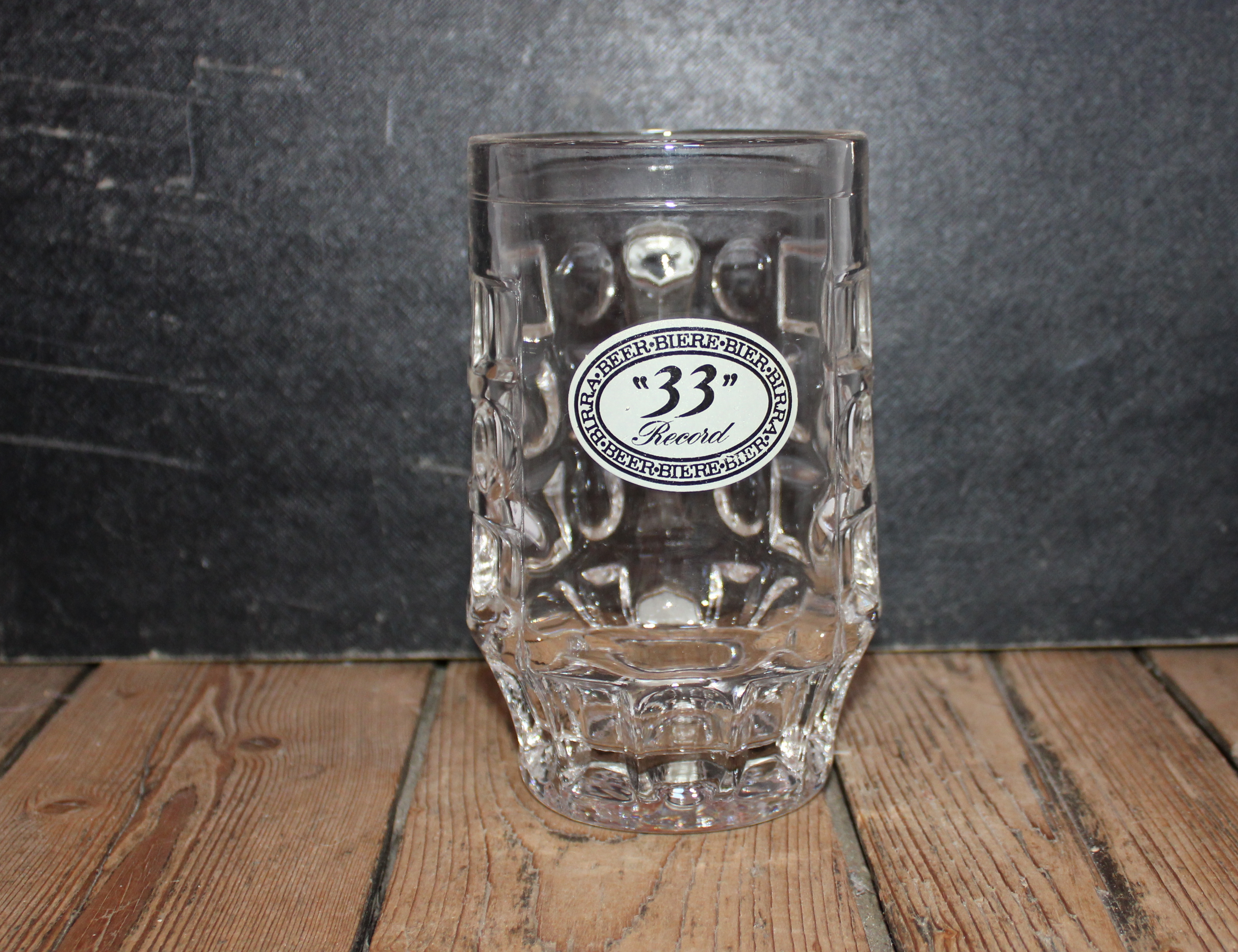 Chope 33 Record 0.5 L